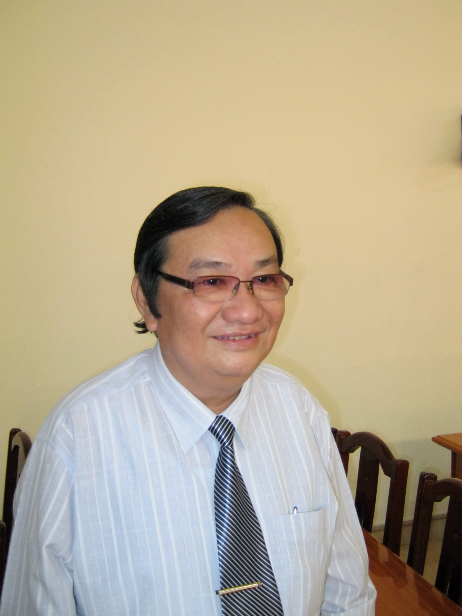 Chân dung nhà thơ Trịnh Bửu Hoài